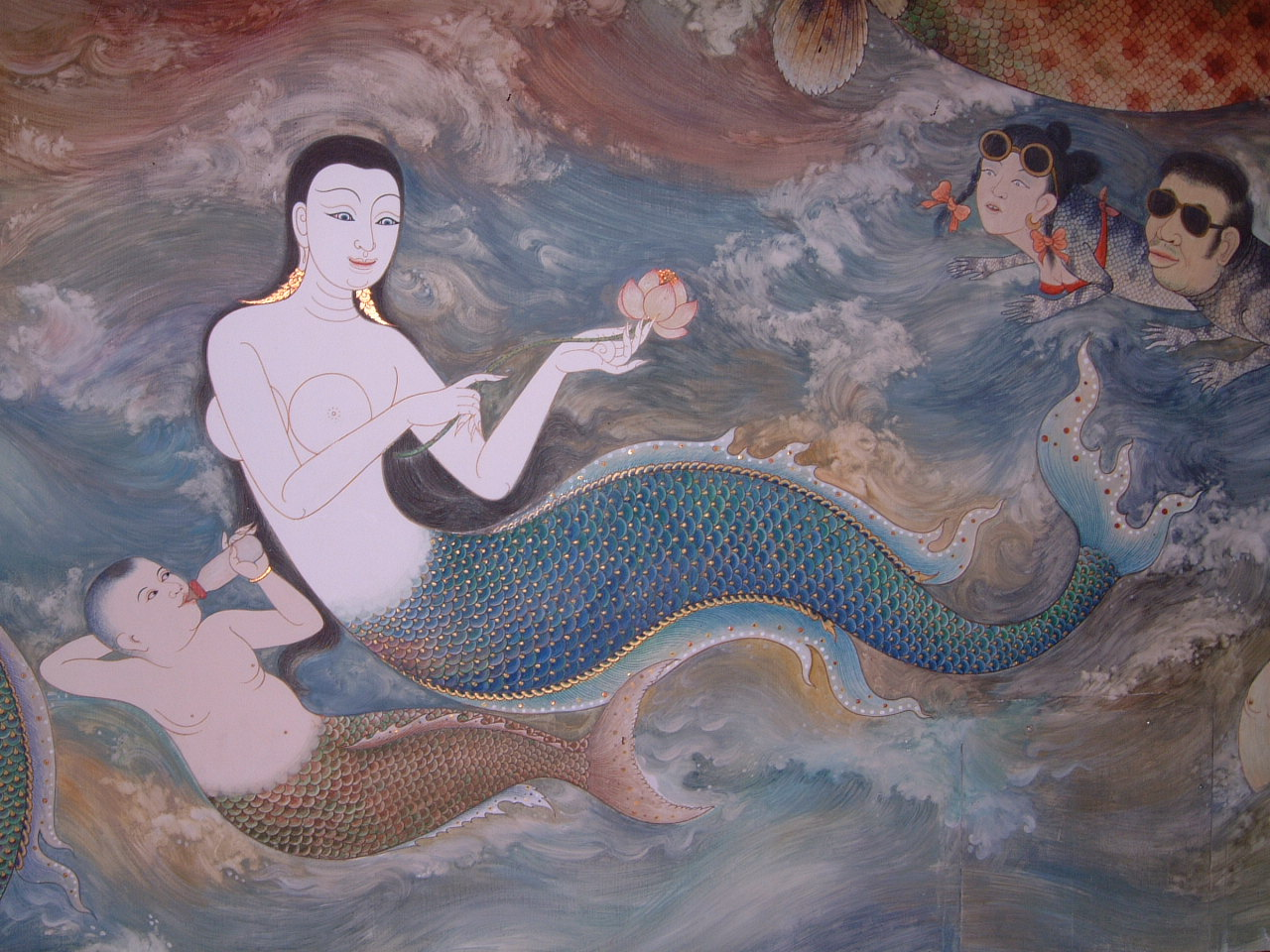 Wat Trithotsathep (วัดตรีทศเทพ วรวิหาร), Bangkok, Thailand